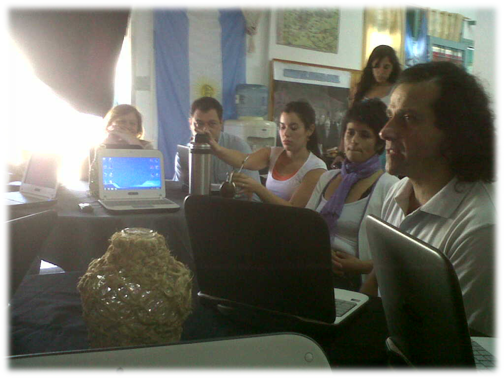 Encuentro de educadores populares en San Vicente, Buenos Aires, Argentina, 2012